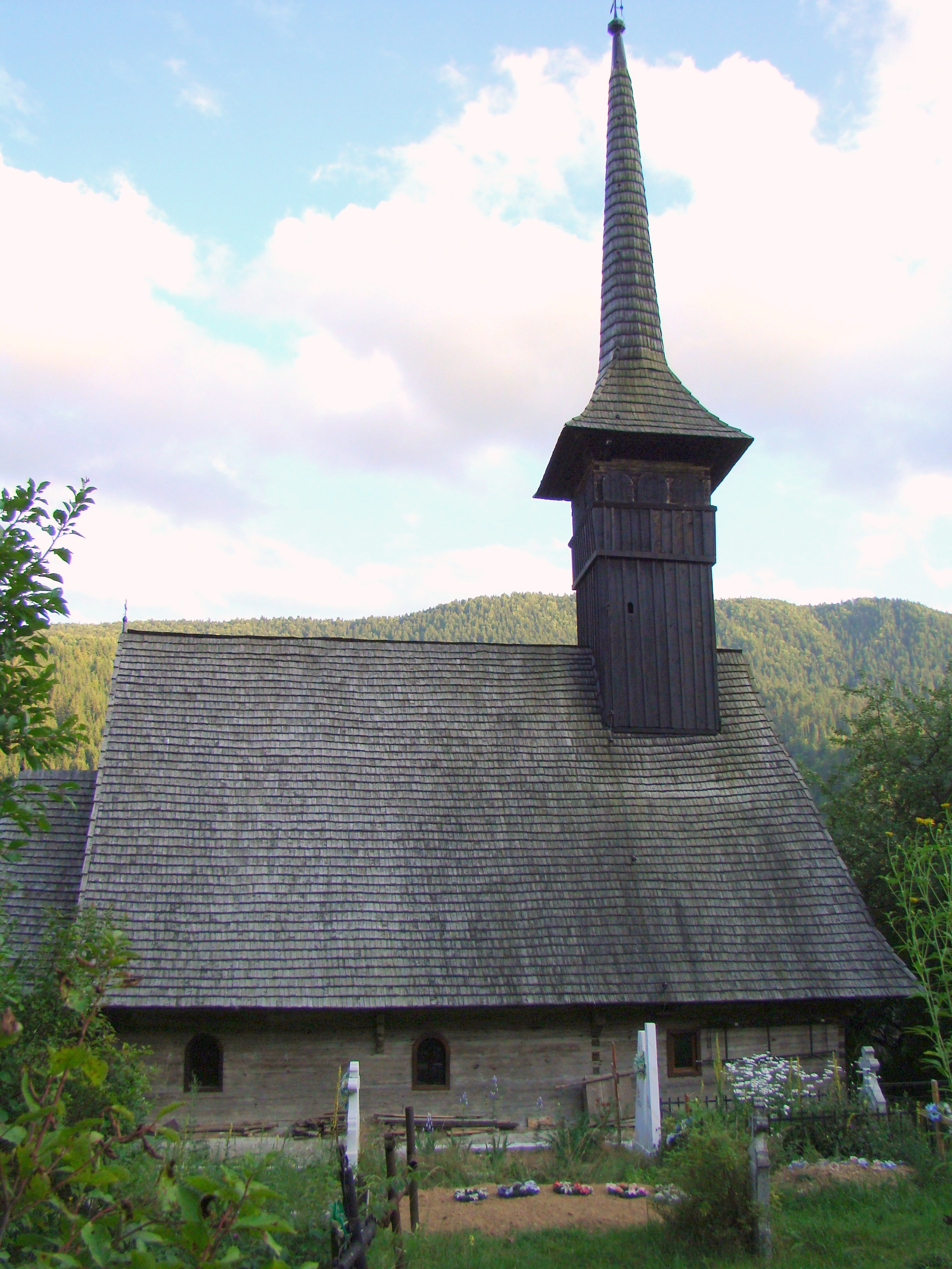 Biserica de lemn din Goiești